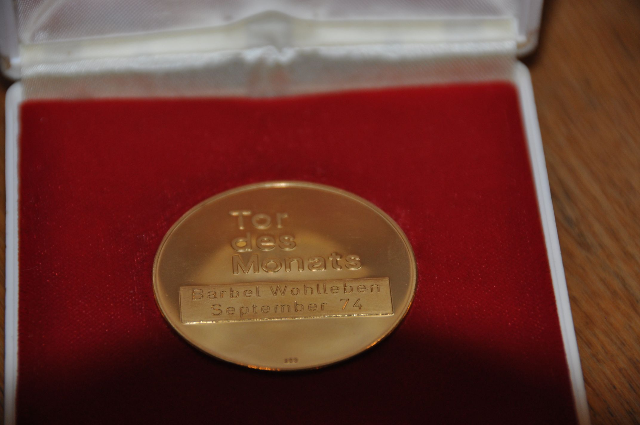 Foto: Nicola Egelhof